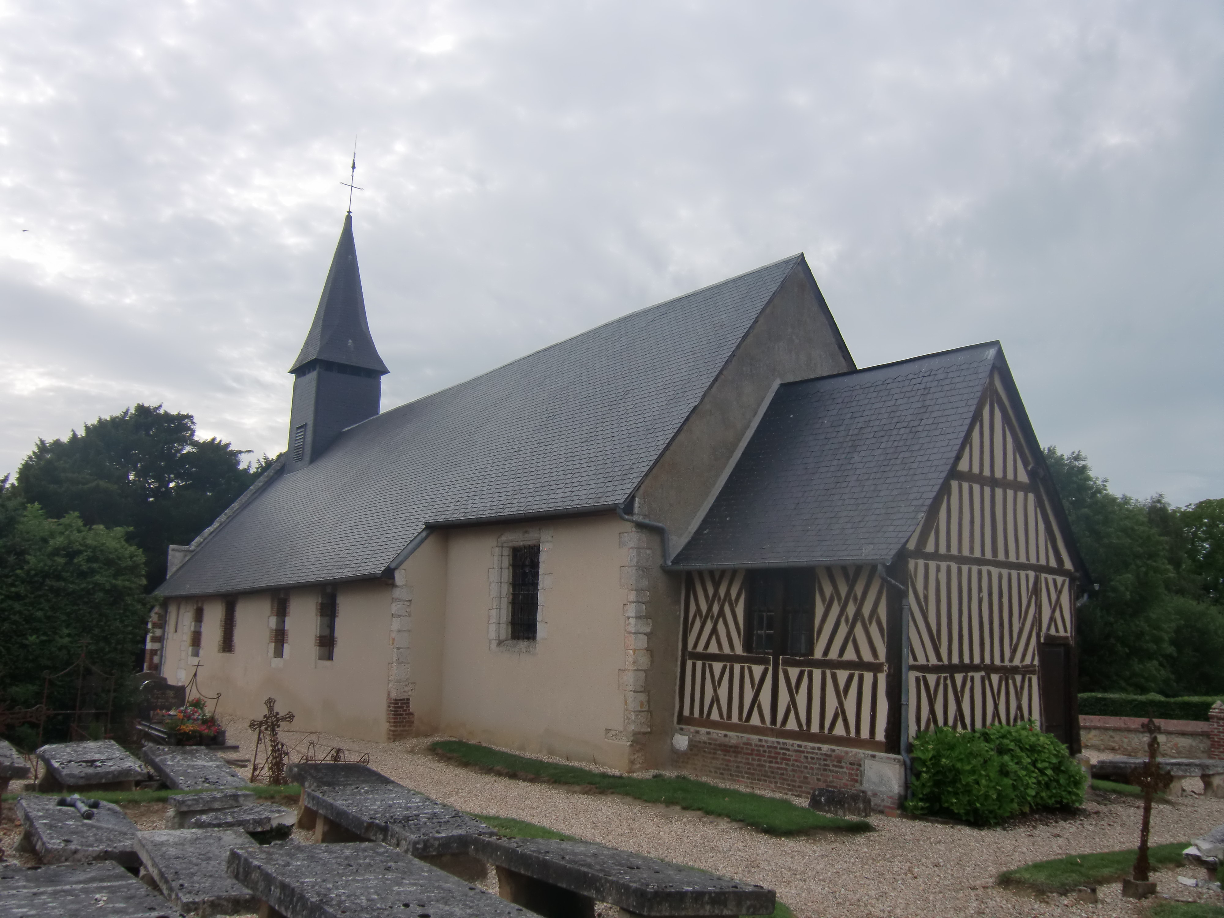 Église de Theillement (Eure, Normandie, France)